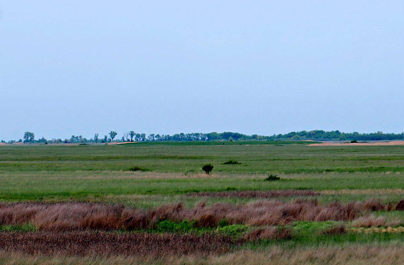 Srpski (latinica): "Debeli hat" se nalazi u centralnom delu rezervata prirode "Pašnjaci velike droplje". Ove veličanstvene ptice koje se štite ovim rezervatom često borave u blizini ovog arheološkog nalazišta, mužjaci vole na ovom uzvišenju da izvode svoje plesove